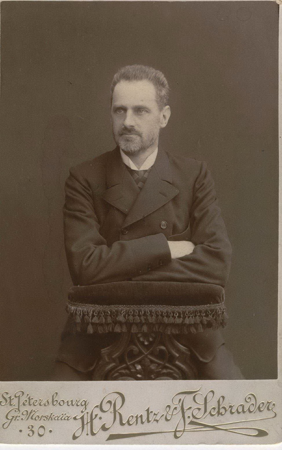 Граф Фридрих Георг Магнус фон Берг (Friedrich Georg Magnus von Berg, 1845-1938 гг.) [1]